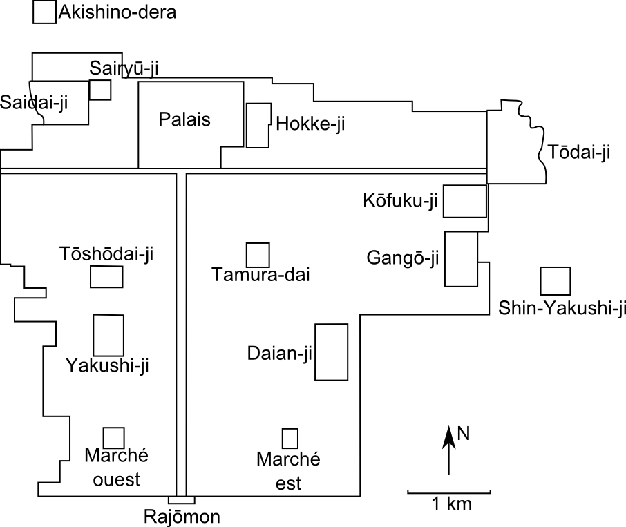 Cartes des principaux édifices (temples, palais ou lieux publics) de Heijokyo (Nara) à la fin du VIIIe siècle. Source : Tanaka Migaku, Heijō-kyō, Iwanami shoten, 1984, p. 4.